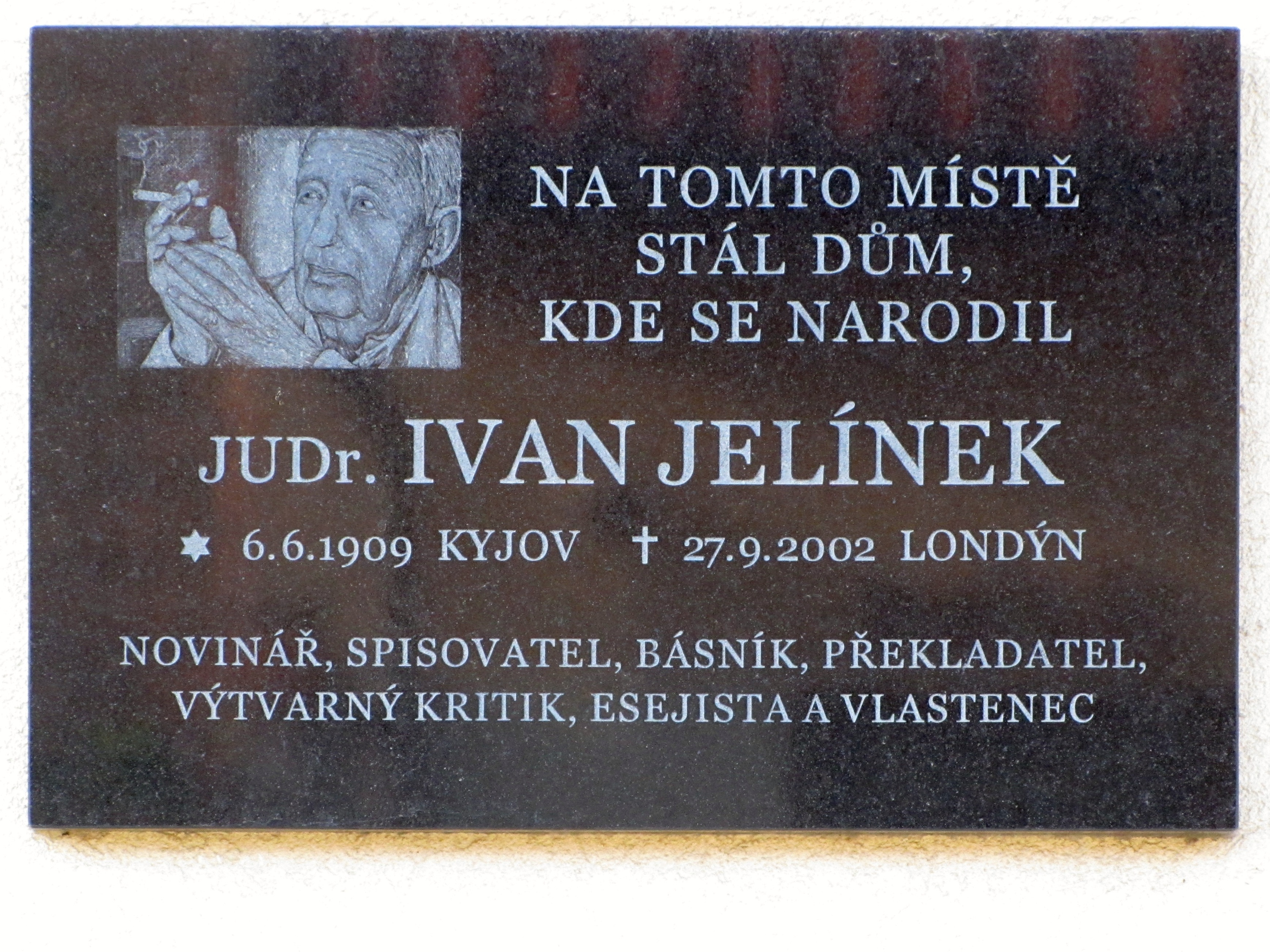 Pamětní deska Ivana Jelínka na budově Domu s pečovatelskou službou na Palackého ulici v Kyjově. Byla odhalena v červnu roku 2015.